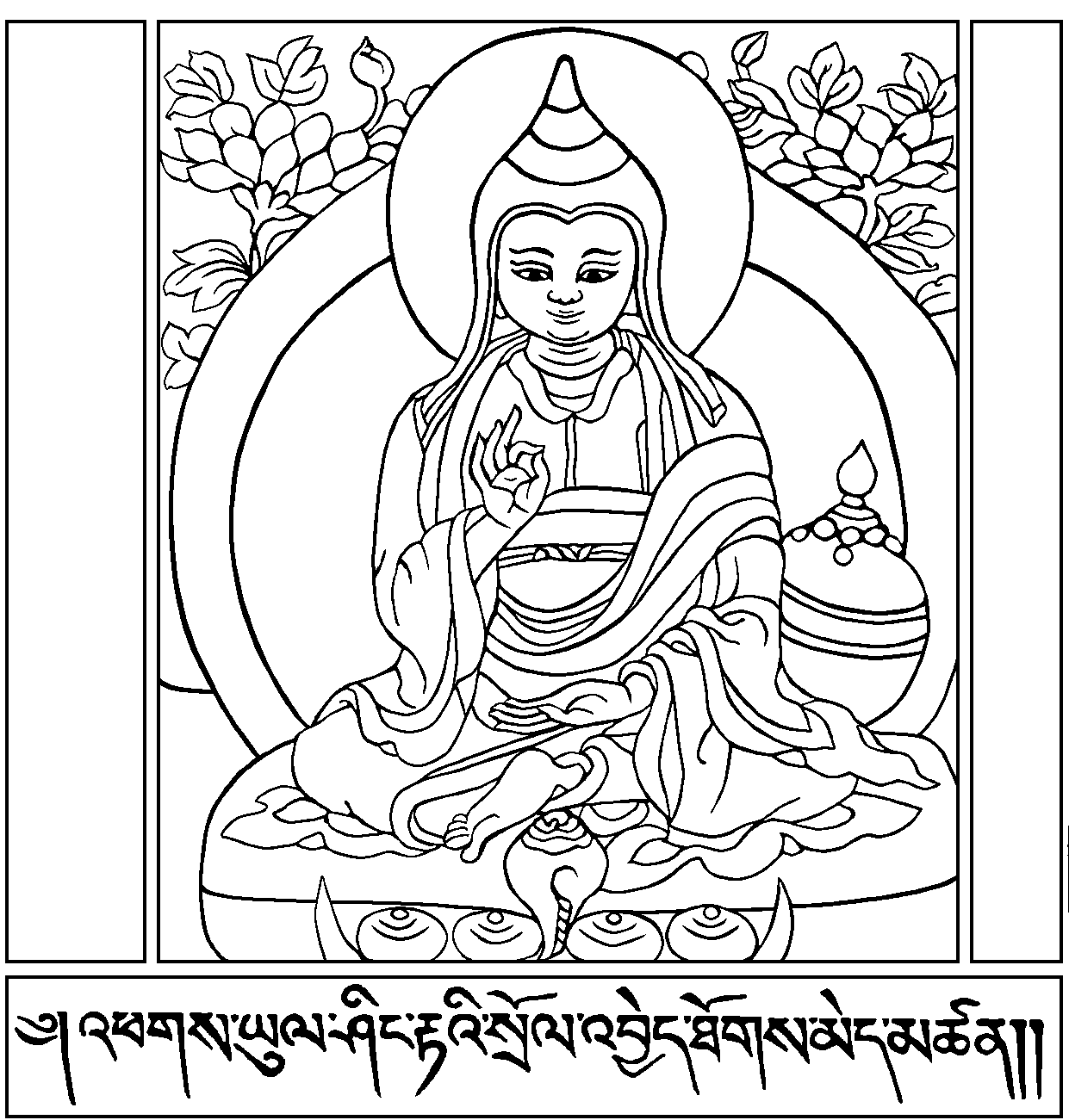 Hình được phép công bố của trang vi: ACIP Thể loại:Đồ tượng Phật giáo